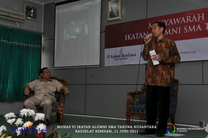 Jokowi dan Prabowo hadir bersama dalam Munas Ikastara 2011